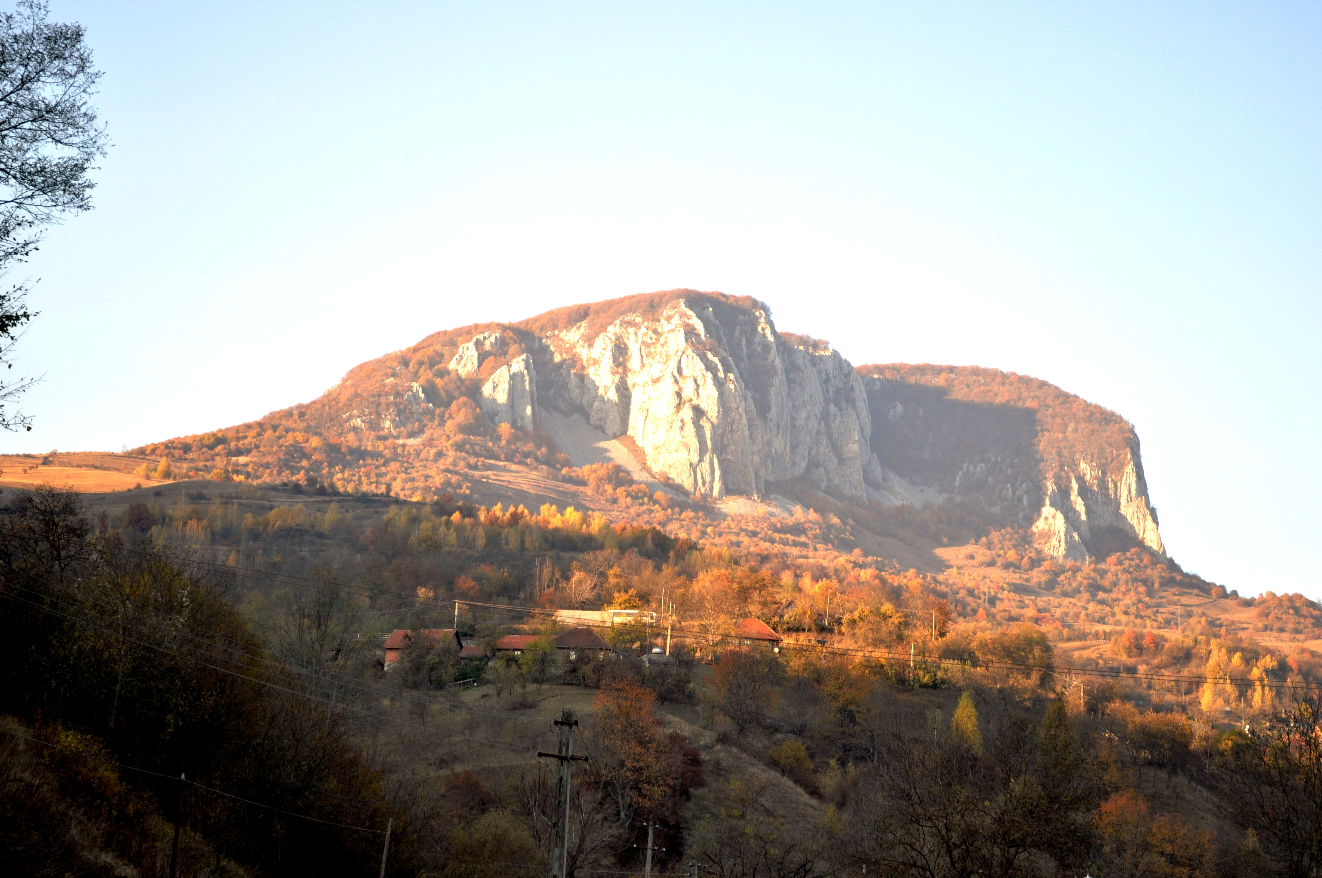 Das Vulcan Gebirge in den Siebenbürger Westkarpaten